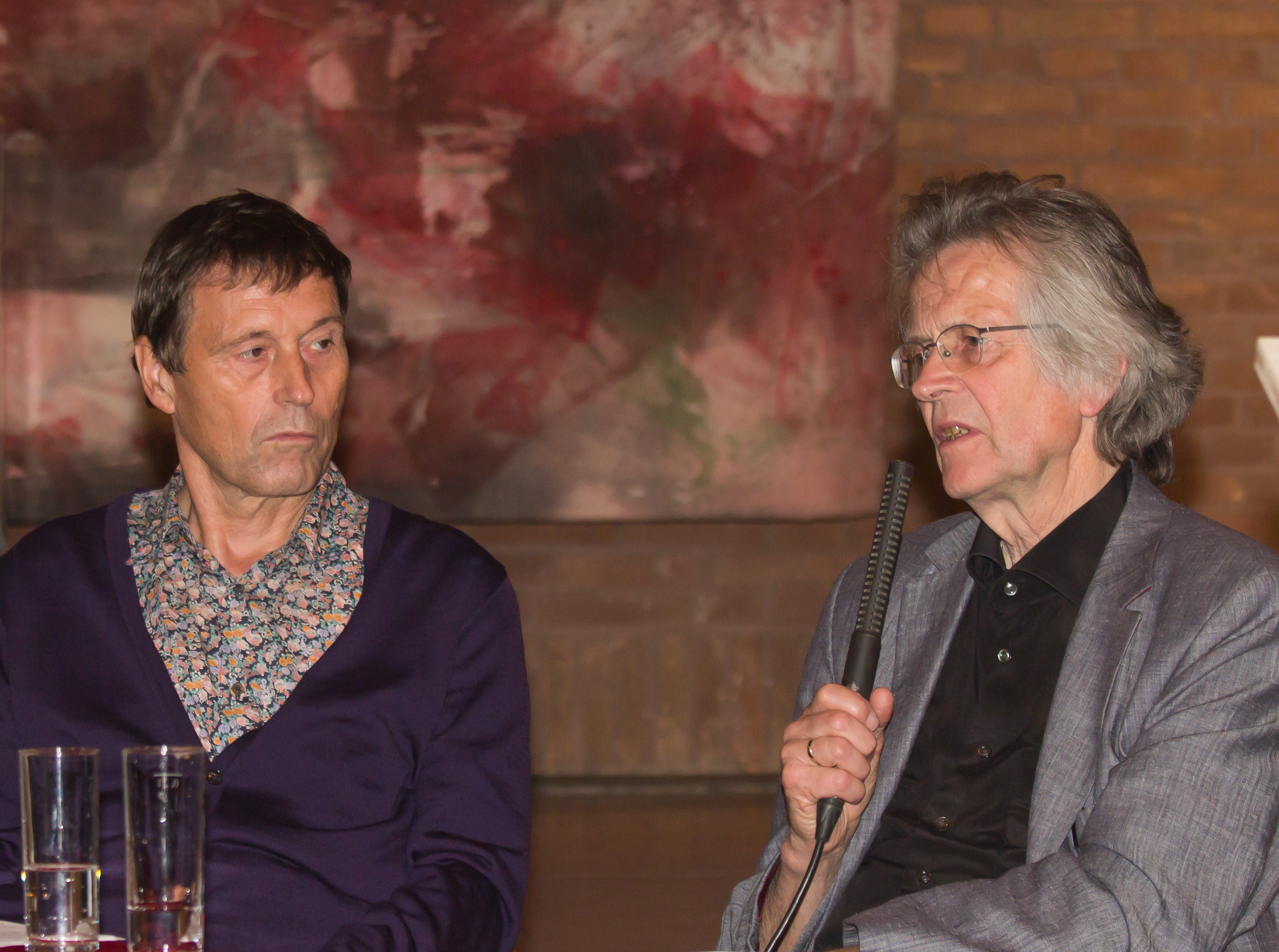 Peter Busmann und Godfrid Haberer, Architekten, als Zeitzeugen von Dani Karavan im Gespräch, der an der Finissage zur Ausstellung „Dani Karavan - Gedenkorte und Environments“ in der Lutherkirche Köln nicht teilnehemn konnte.